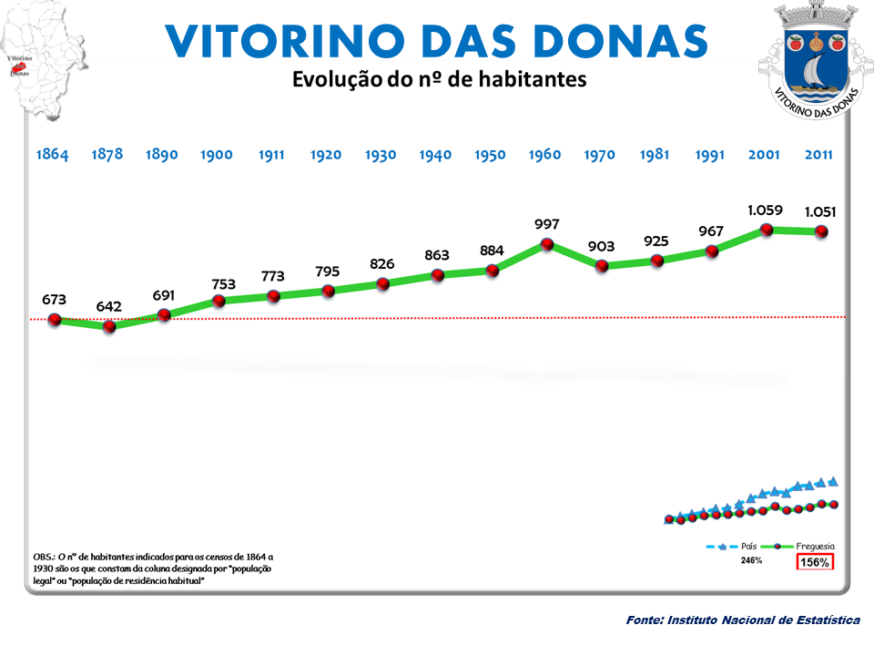 Censos 1864/2011